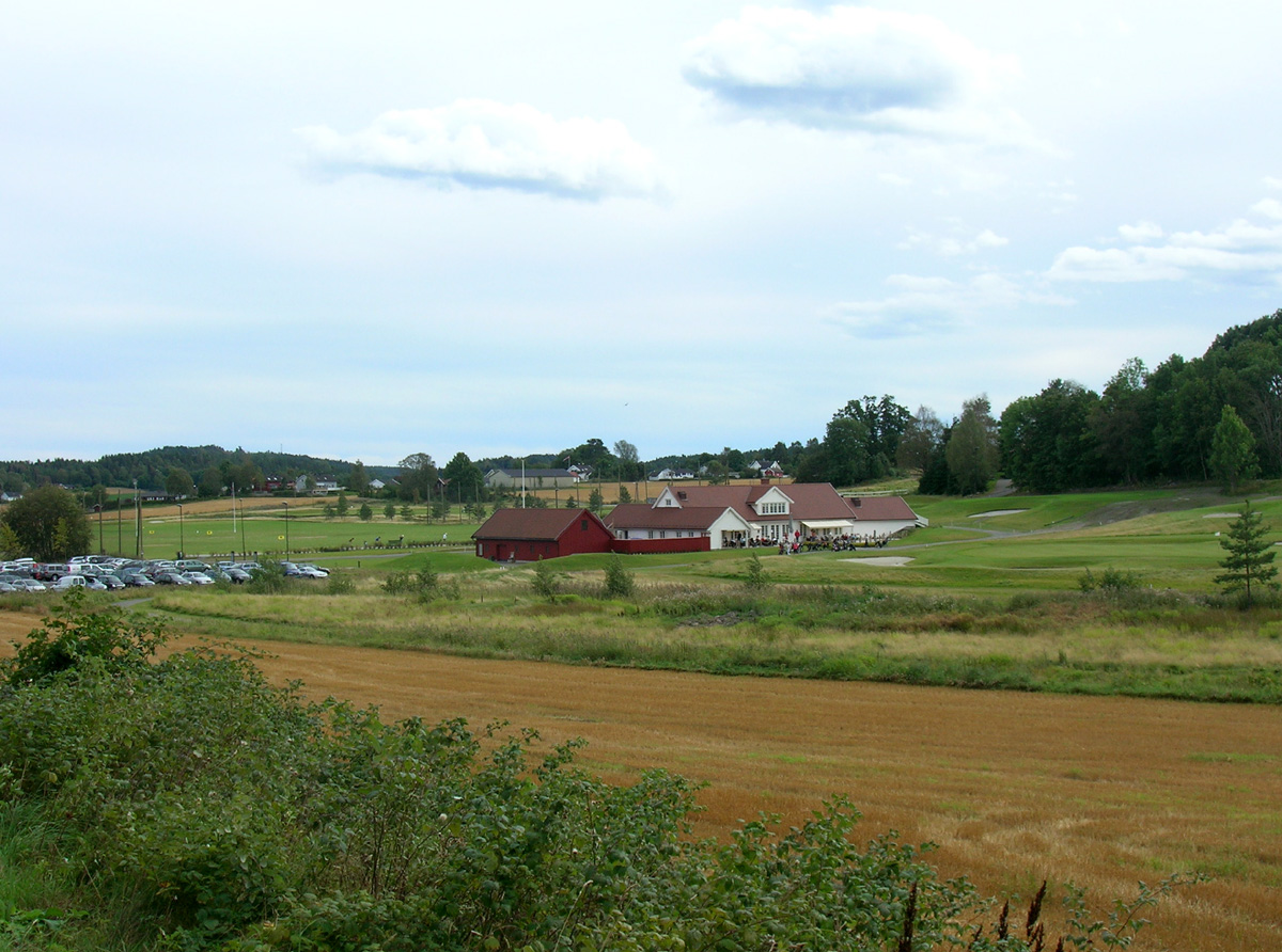 Klubbhuset til Nøtterøy golfklubb